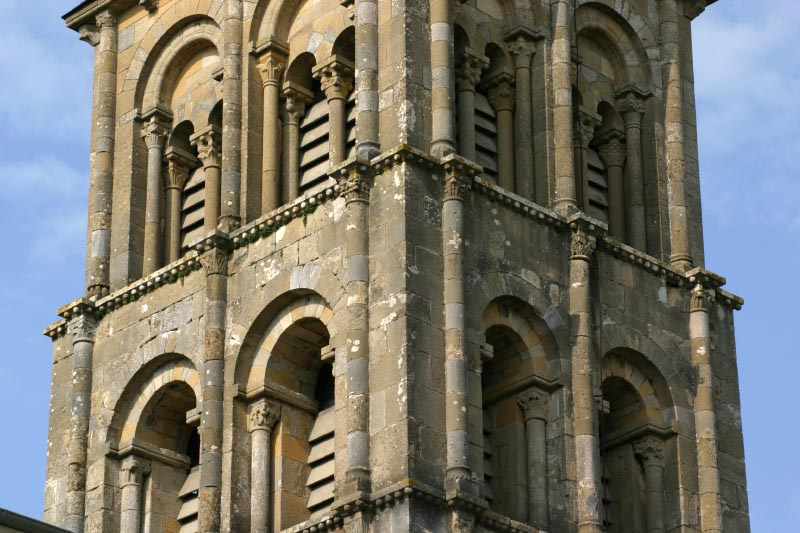 Clocher de l'église de Saint-Laurent-en-Brionnais